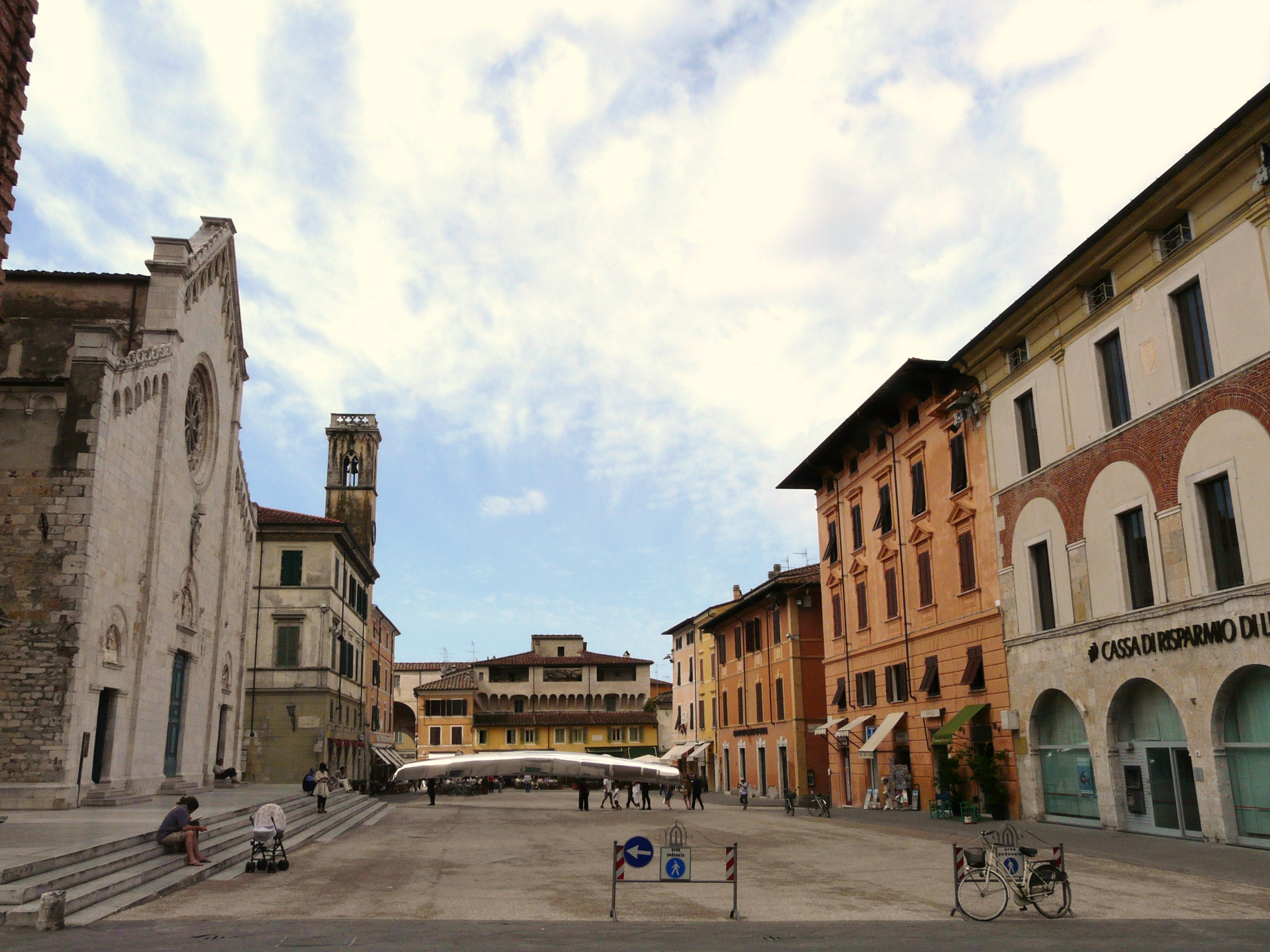 Piazza Duomo, Pietrasanta, Toscana, Italia